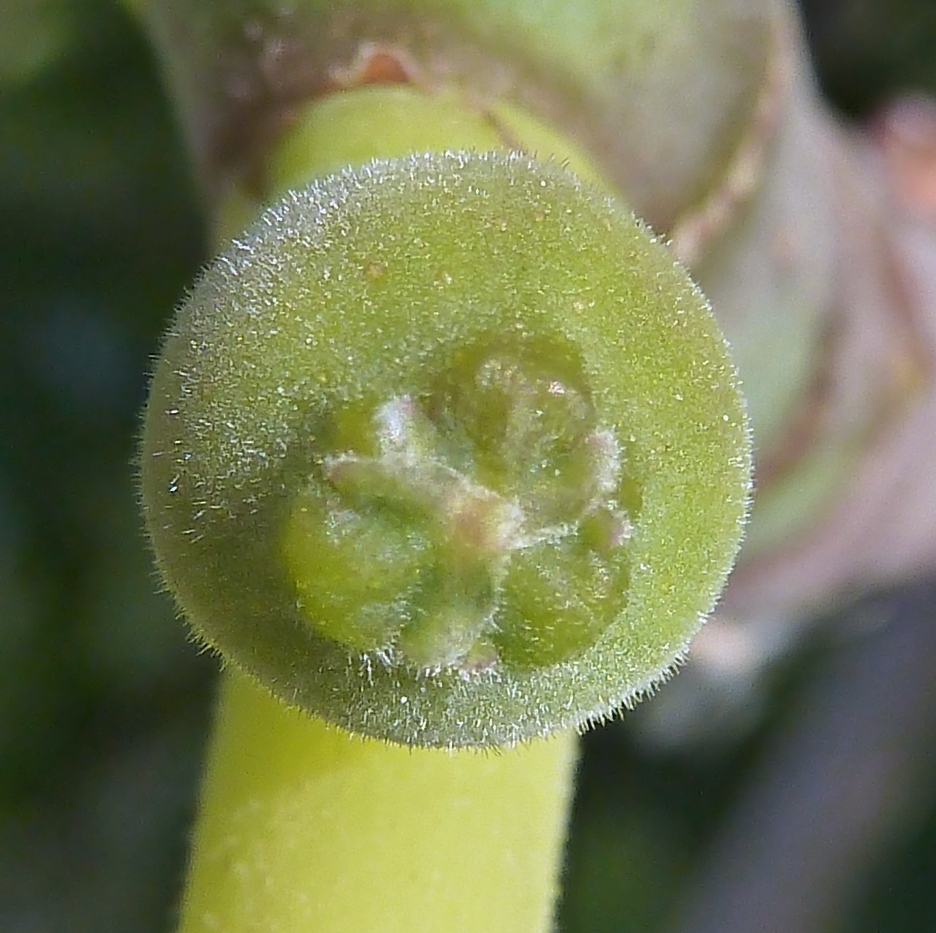 Ficus carica (Higuera/higo) : Ostíolo apical aun cerrado de un sícono pre-antesis - Avda de la Libertad, Albatera (Alicante, España).